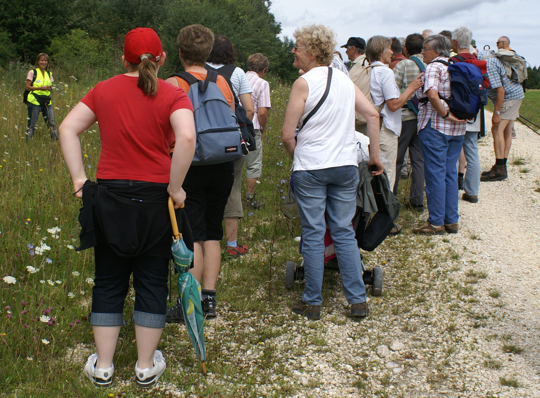 Auf geführten Touren erfährt man von TrÜP-Guides Wissenswertes über Flora und Fauna sowie über Landschafts- und Militärgeschichte des ehemaligen Truppenübungsplatz Münsingen